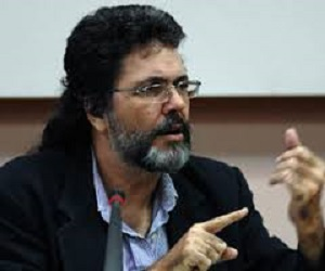 Escritor cu